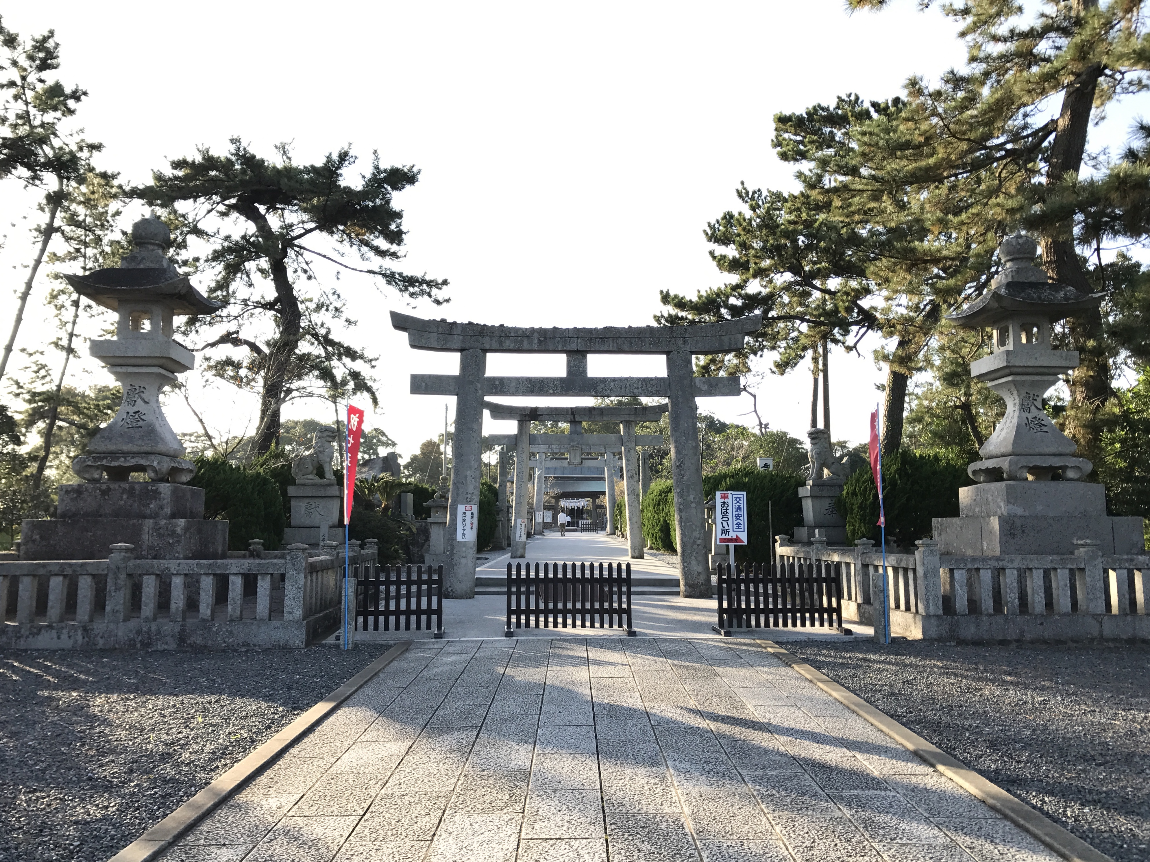 綱敷天満宮の鳥居